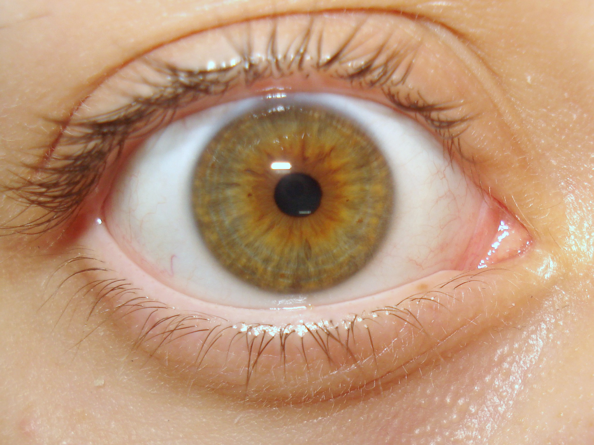 Lidské oko